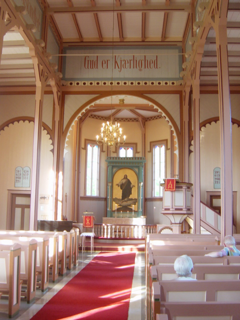 Fræna and the Myrbostad kirke